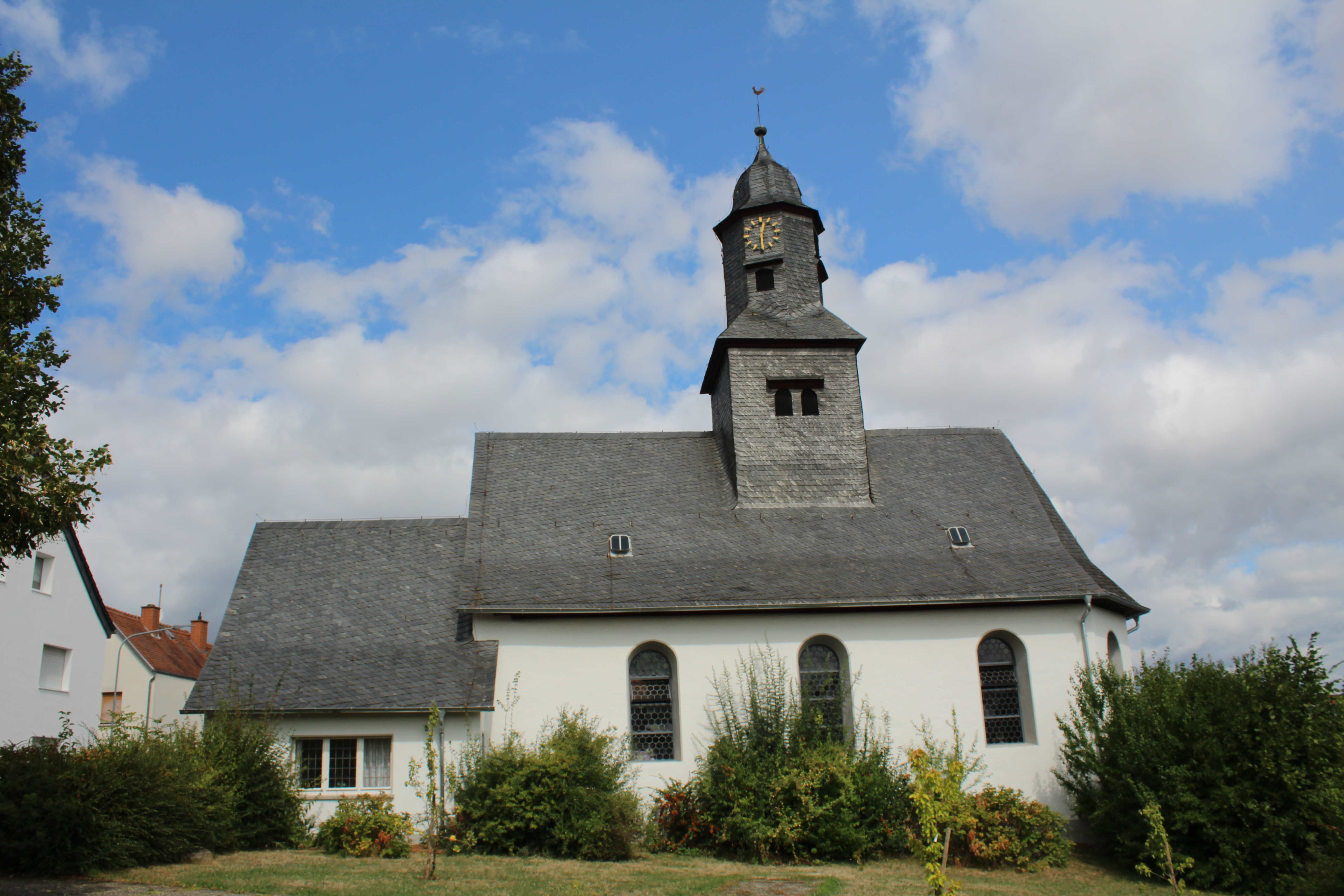 Evangelische Kirche Klein-Rechtenbach, Gemeinde Hüttenberg, Lahn-Dill-Kreis, Hessen, Deutschland